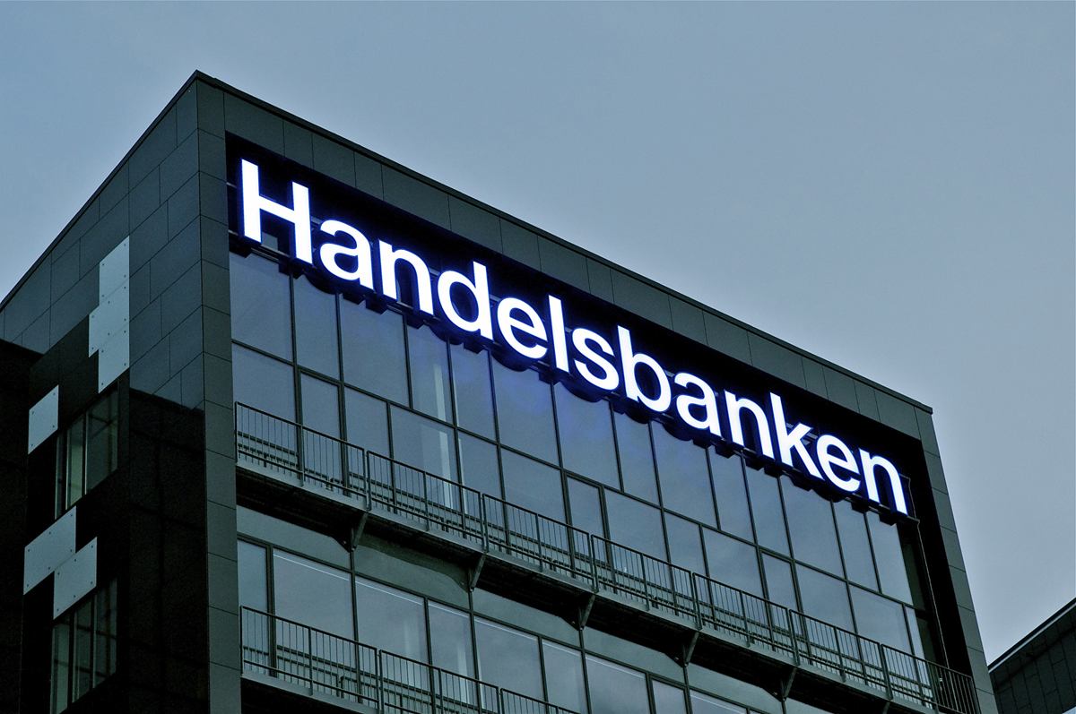 Handelsbankens hovedkontor i Danmark